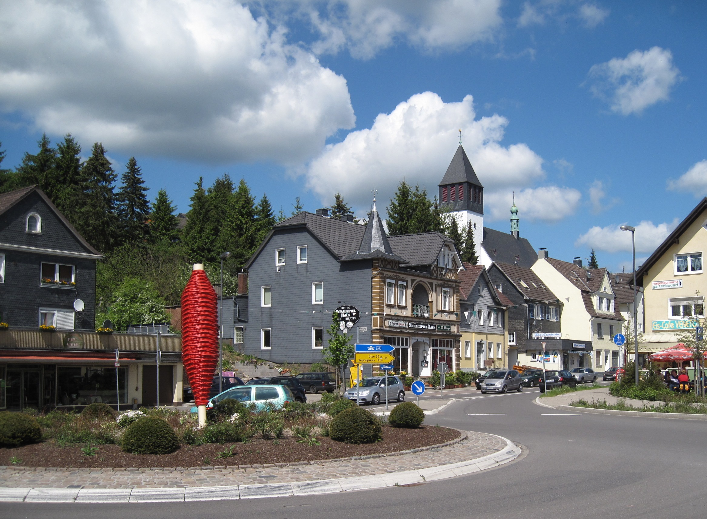 Kunst am Kreisverkehr (Südkreisel) an der B 55 / Südring / Kölner Straße in Bergneustadt. Verzinkte Garnspindel. Die rot lackierte Spindel ist etwa vier Meter hoch und wiegt 1,5 Tonnen. Sie wurde Bergneustadt vom Textilunternehmer Karl Adolf Krahwinkel zur Erinnerung an die textile Vergangenheit des Ortes geschenkt.